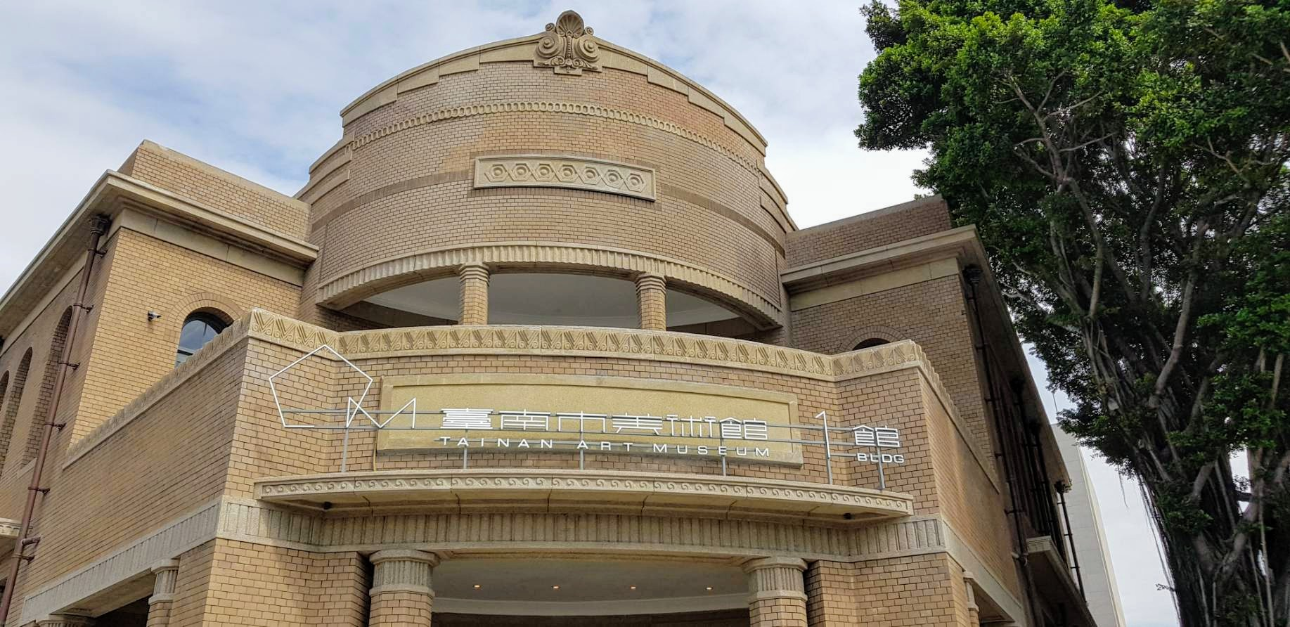 臺南市美術館1館 外觀